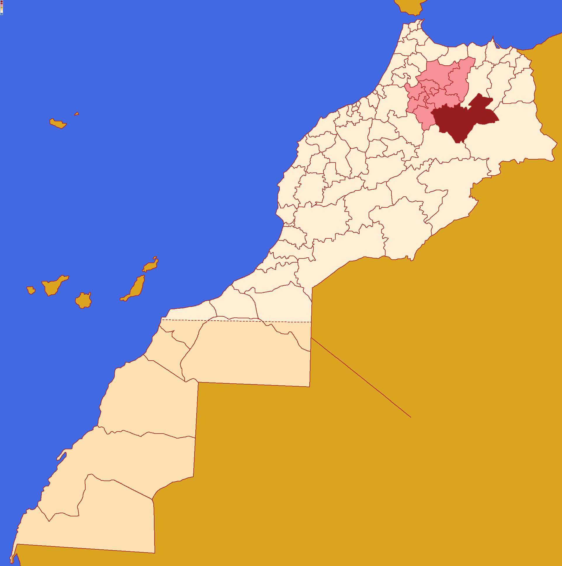 Localização da província de Boulemane ,dentro da região de Fez-Meknès e dentro de Marrocos.Conforme a reforma administrativa de 2015.